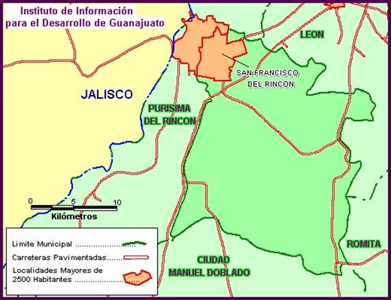 Mancha urbana conformada por San Francisco del Rincón y Purísima de Bustos